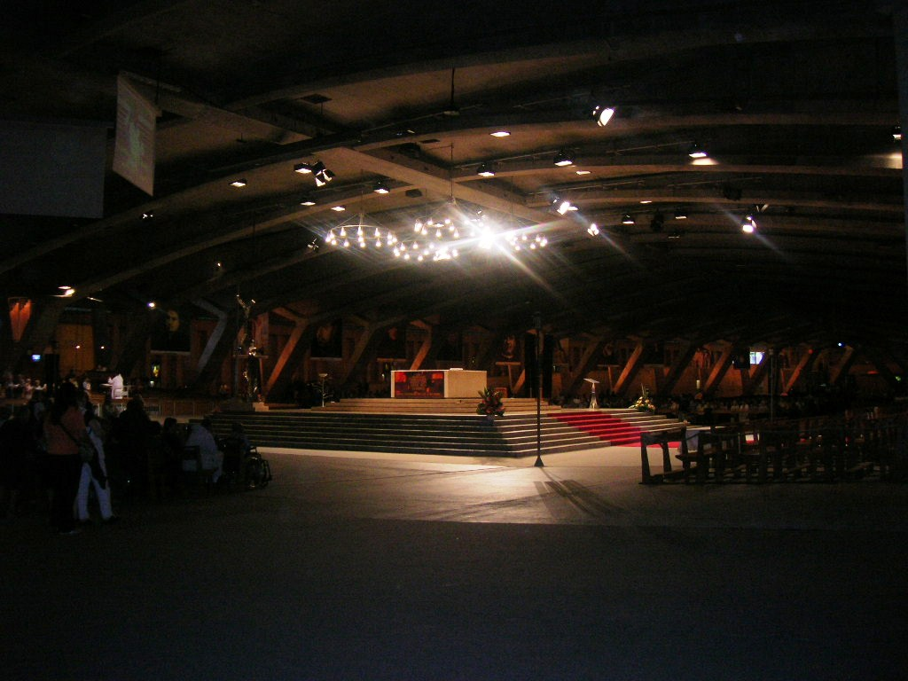 L'altare maggiore della Basilica di San Pio X a Lourdes